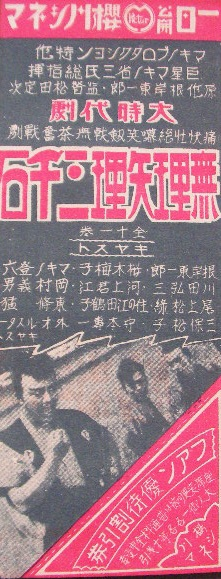 『無理矢理三千石』、1929年公開時のフライヤー